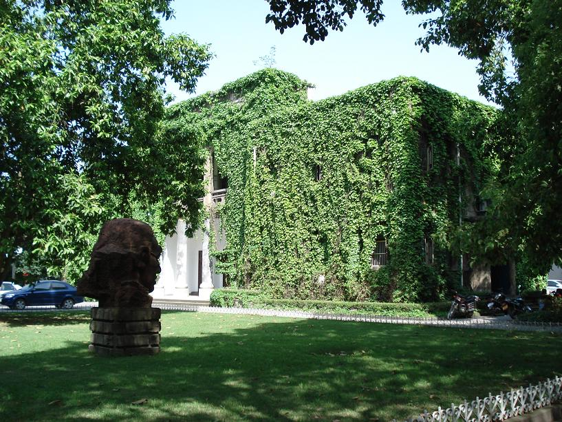 重慶市西南大學東方紅俱樂部